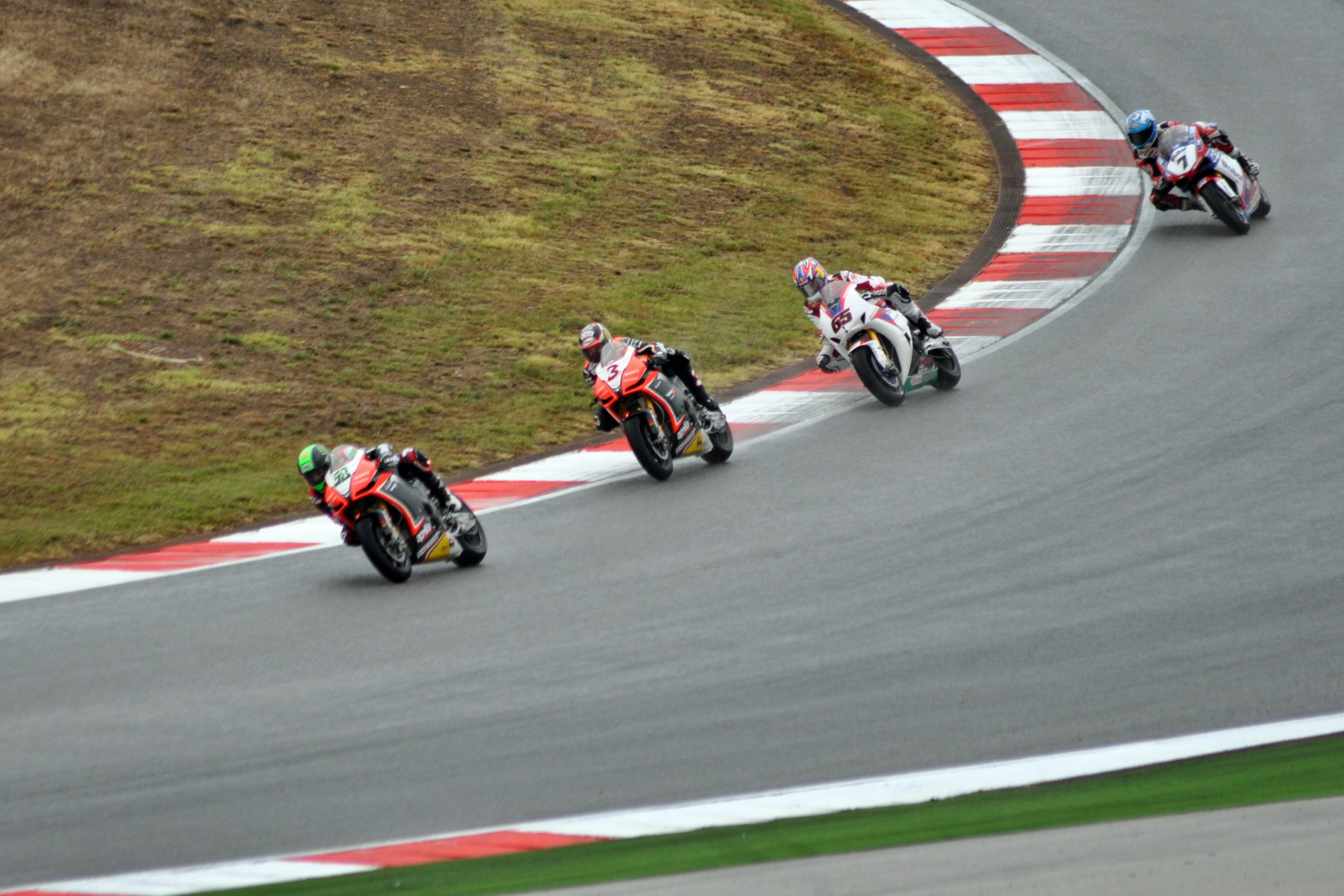 Autódromo Internacional do Algarve (2012-09-23), by Klugschnacker in Wikipedia (30) Eugene Laverty (IRL) auf Aprilia, Max Biaggi (ITA) auf Aprilia, Jonathan Rea (GBR) auf Honda, Carlos Checa (ESP) auf Ducati